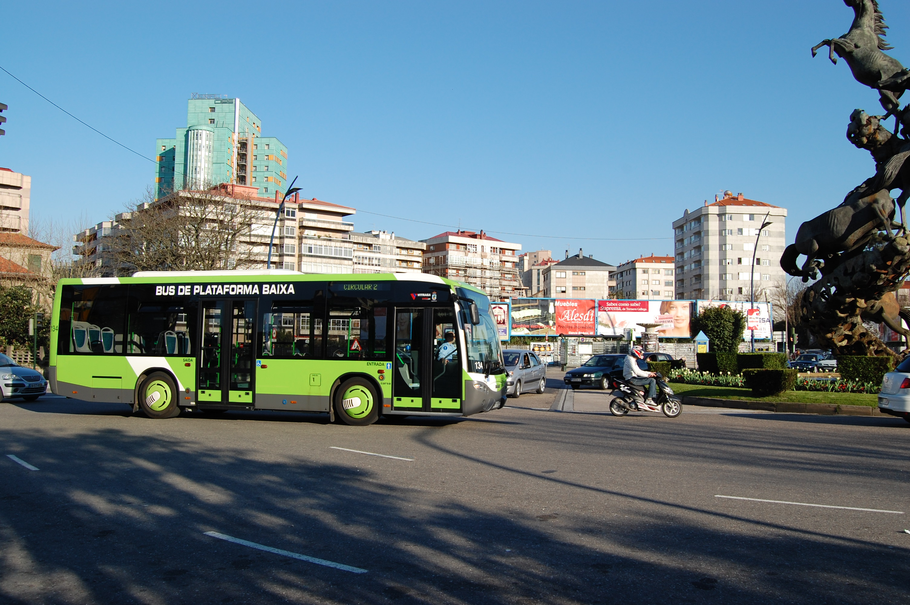 O autobus Circular 2 na Praça de Espanha em Vigo.